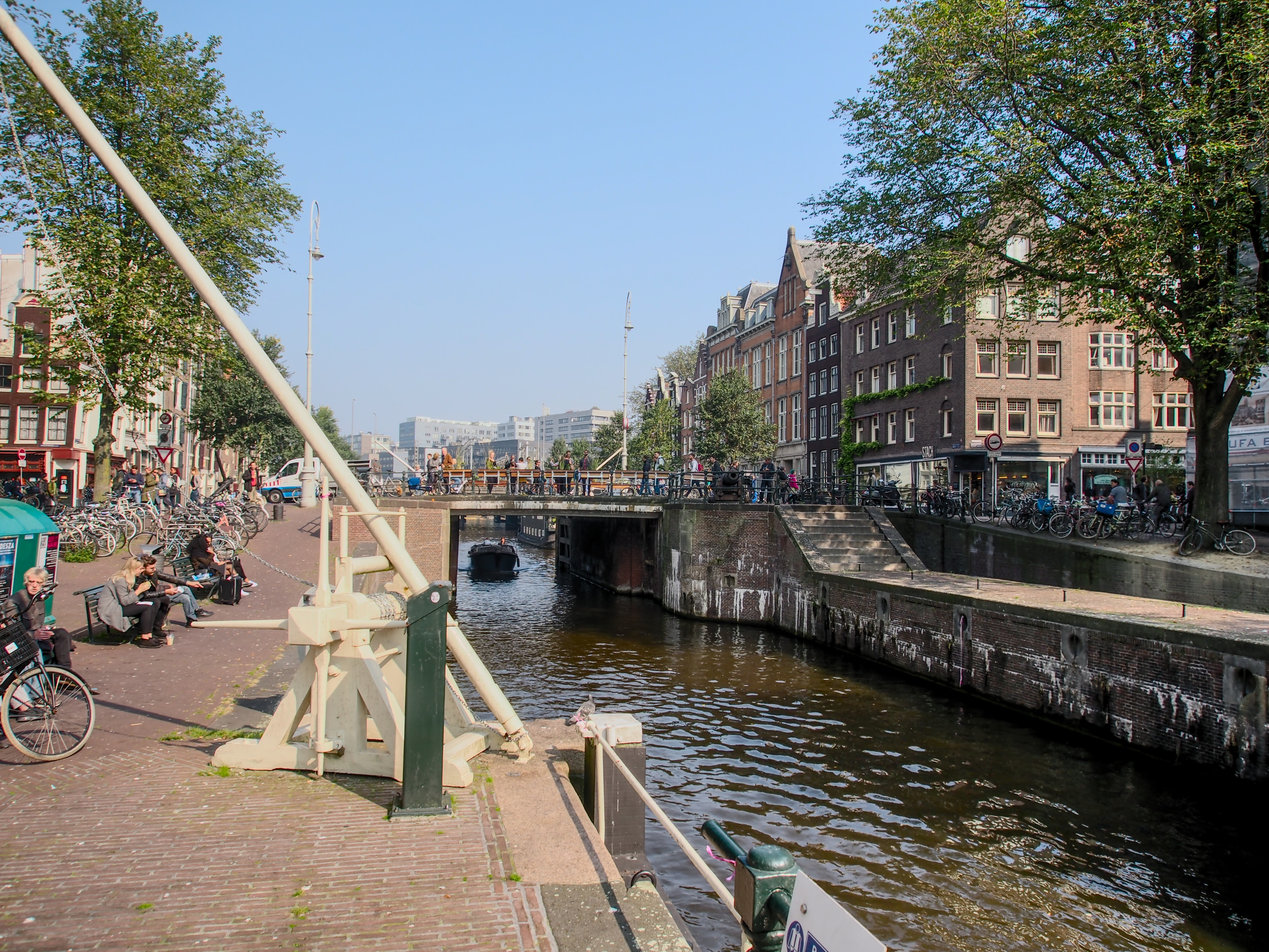 Photographed in Amsterdam, The Netherlands. Eenhoornsluis is bridge, Eenhoornschutsluis is canal lock